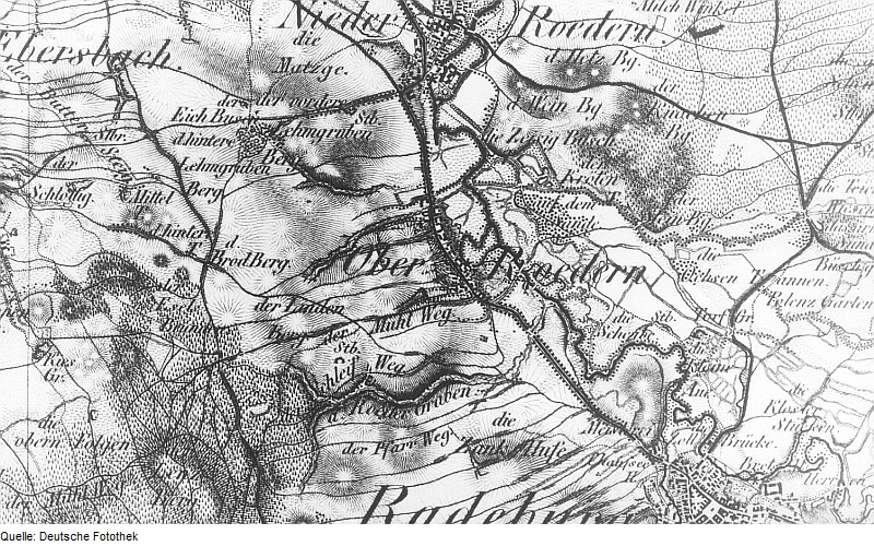 Original image description from the Deutsche Fotothek Ebersbach-Rödern. Oberreit, Sect. Großenhain, 1841/43